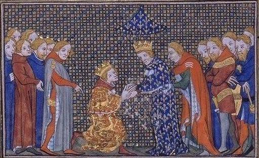 Eduard III. von England huldigt Philipp VI. von Frankreich (1329)